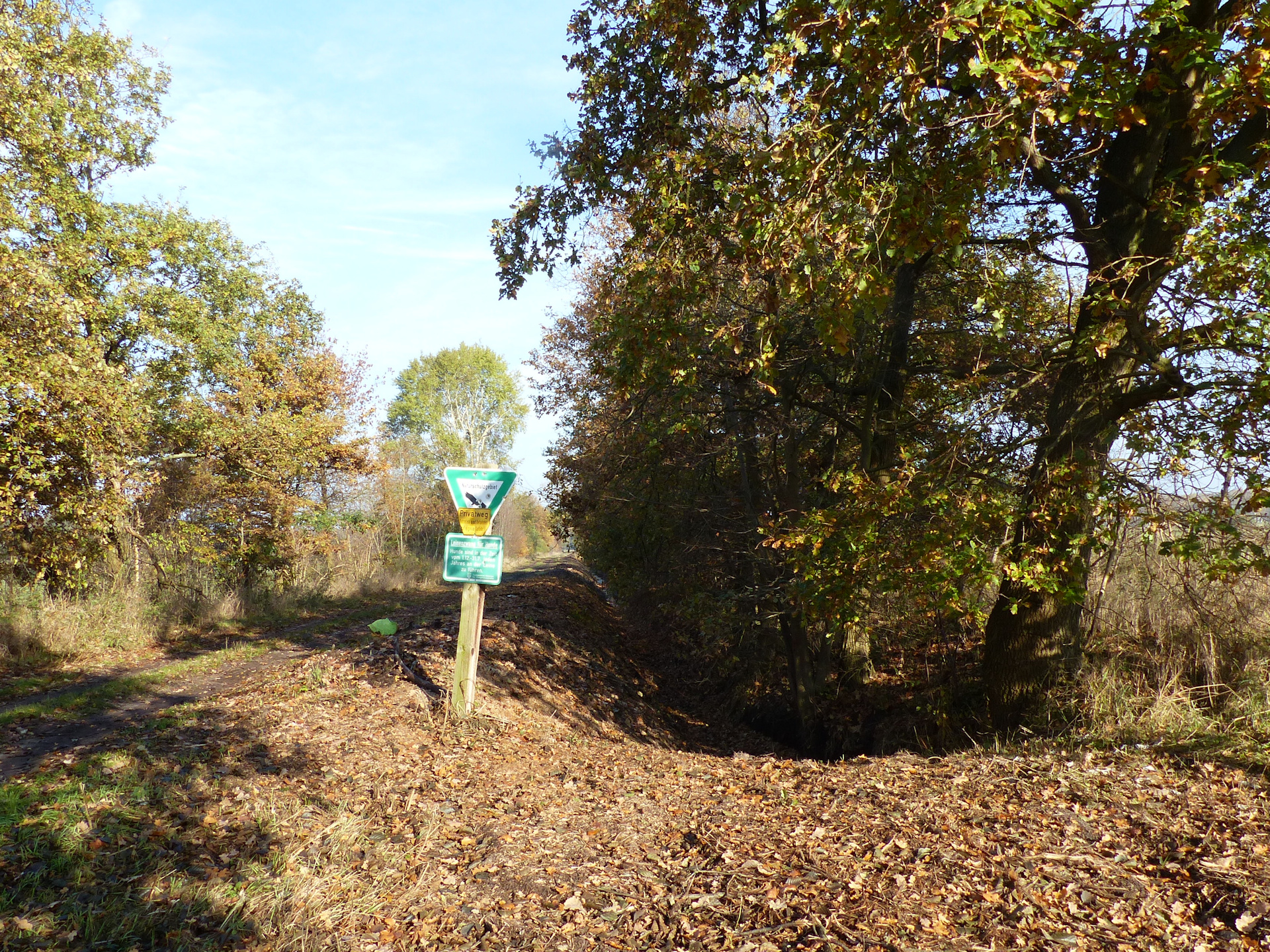 Der Viehmoorgraben beim Eintritt in das Naturschutzgebiet nach einem Knick Richtung Norden (Blickrichtung Norden)